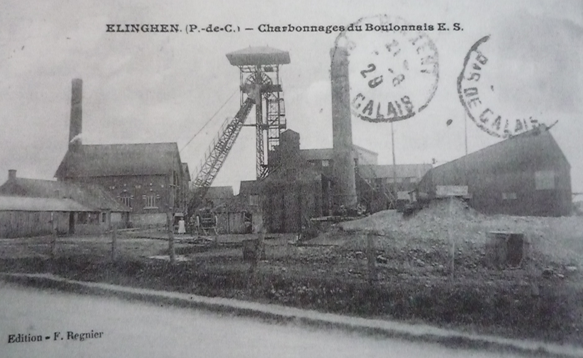 Voir Mines du Boulonnais